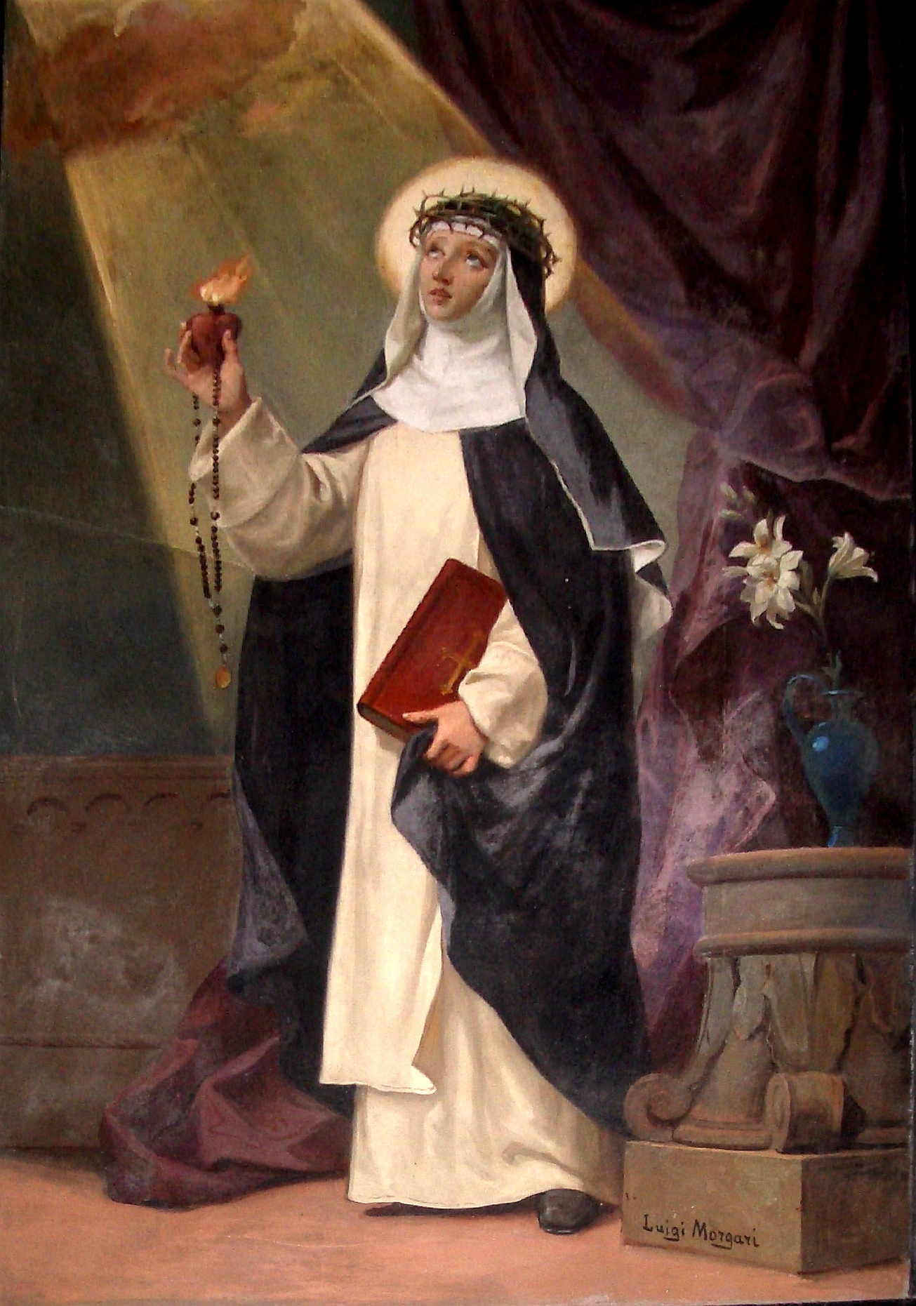 Tomb of Beata Maddalena Panattieri, chiesa di San Domenico, Trino, Vercelli, Italy